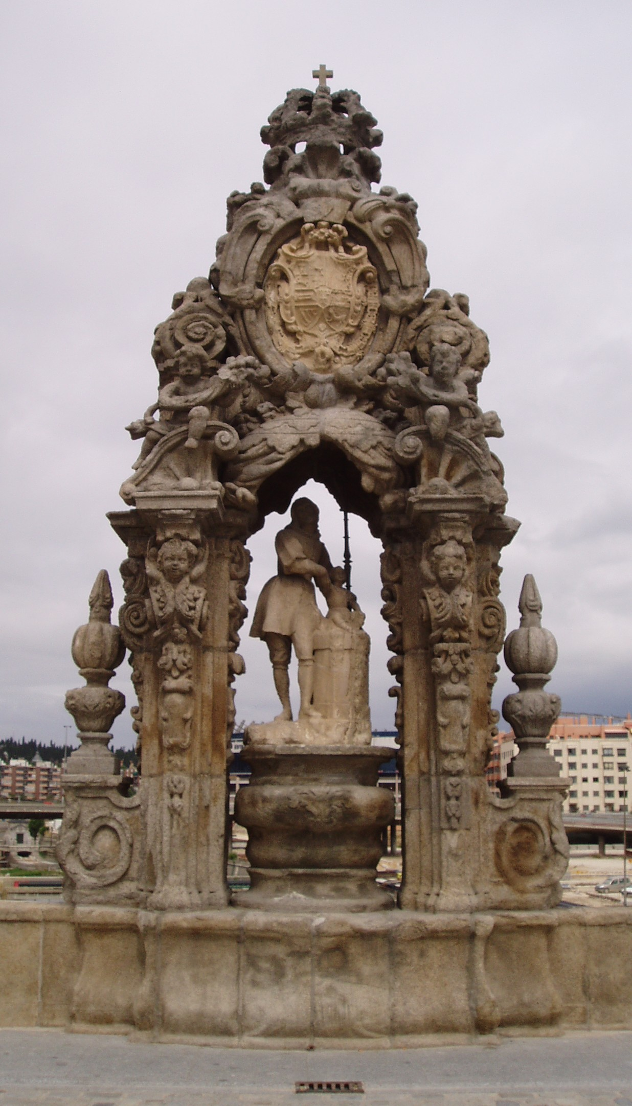 San Isidro. Puente de Toledo. Madrid. España